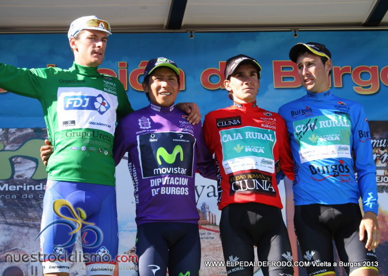 Ganadores de las distintas clasificaciones de la Vuelta a Burgos 2013. De izquierda a derecha: anthony Roux, Nairo Quintana, Amets Txurruka y Fabricio Ferrari